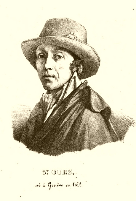 Portrait de Jean-Pierre Saint-Ours, publié en frontispice de son éloge funèbre.